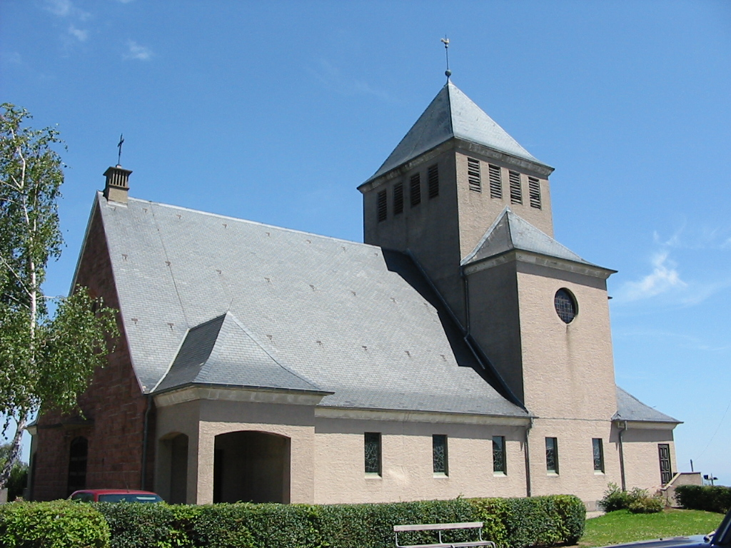 Église Saint-Joseph à Labaroche (Haut-Rhin)